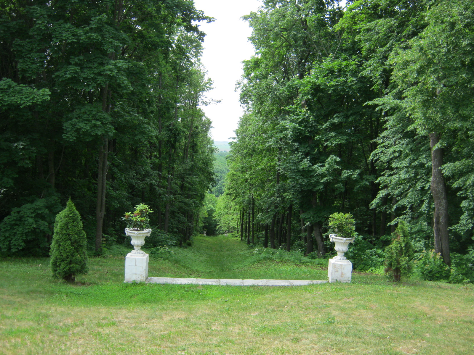 Парк п. Баронский: Гагинский район, Нижегородская область This image is related to the protected area of Russia number 5210224